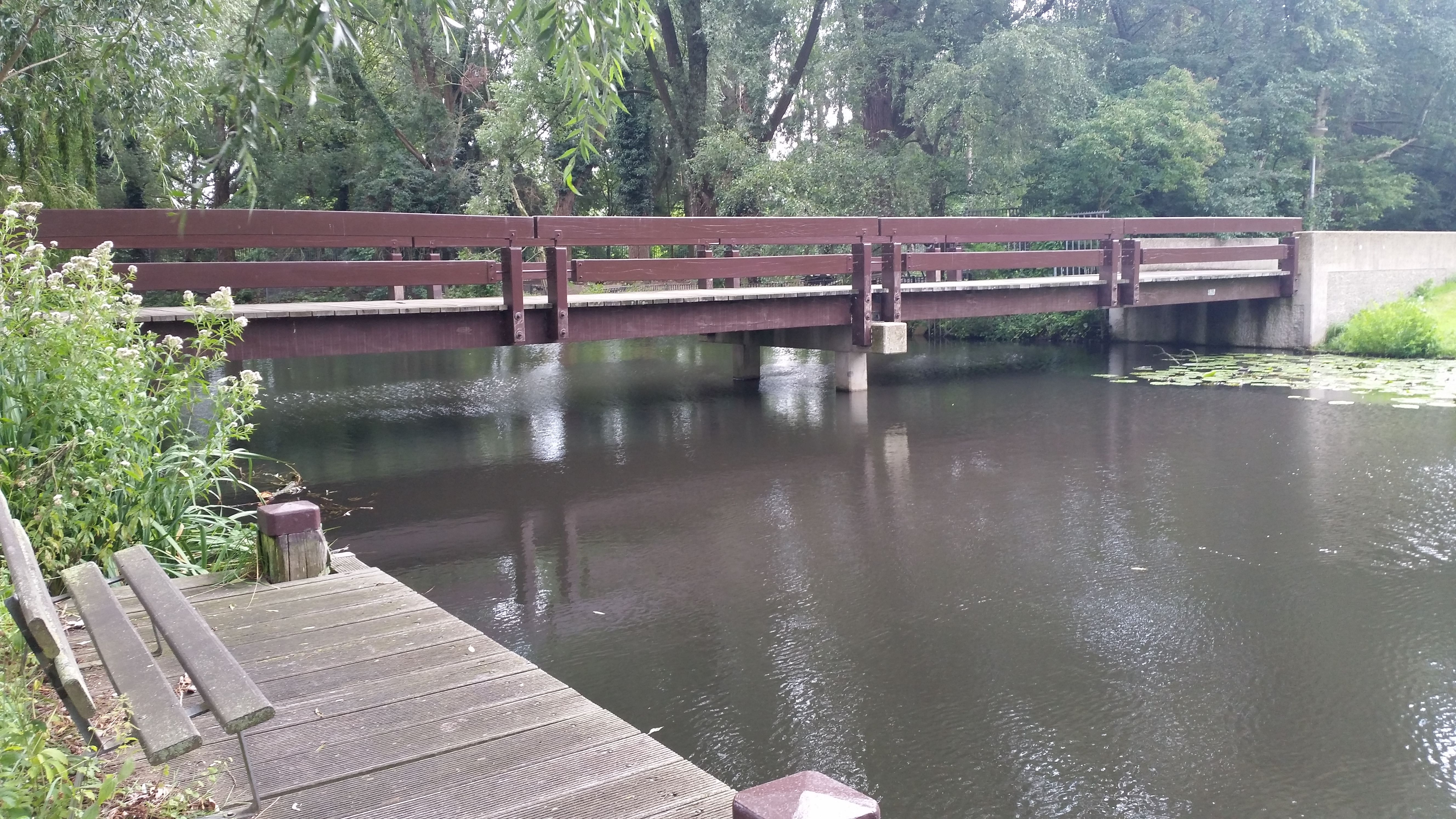 Zijaanzicht van Brug 839 (in Amsterdam)